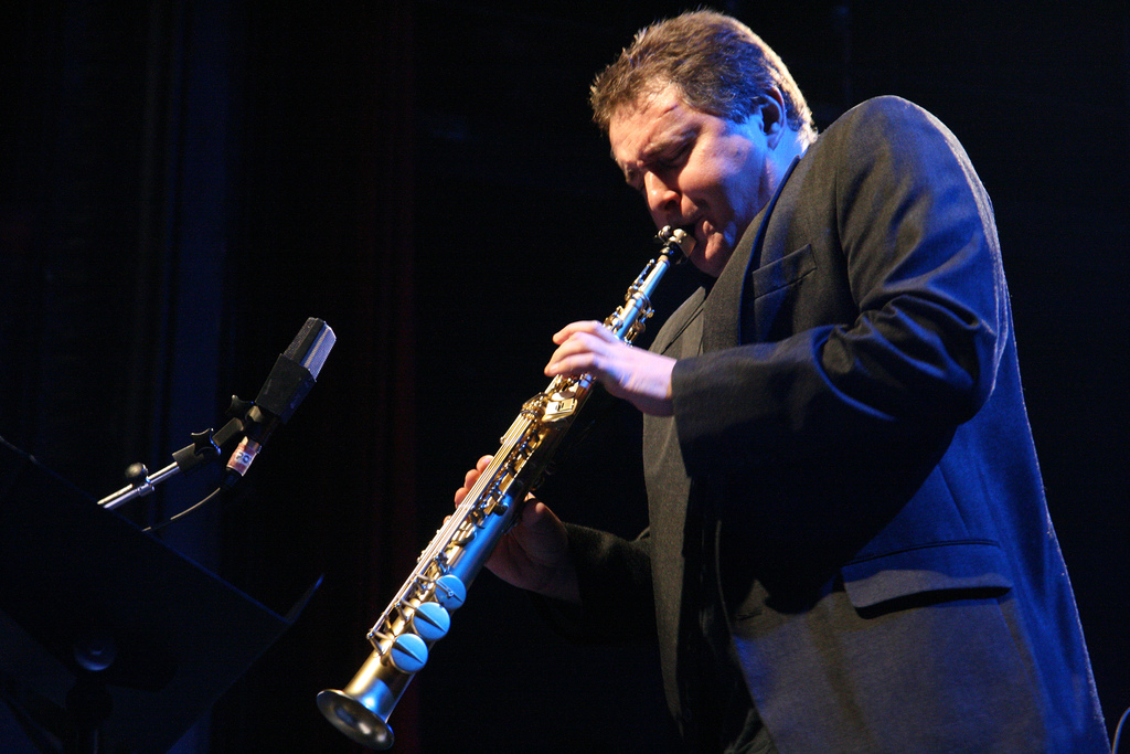 Sylvain Beuf au saxophone soprano, en concert à la Cigale avec Jean-Pierre Como